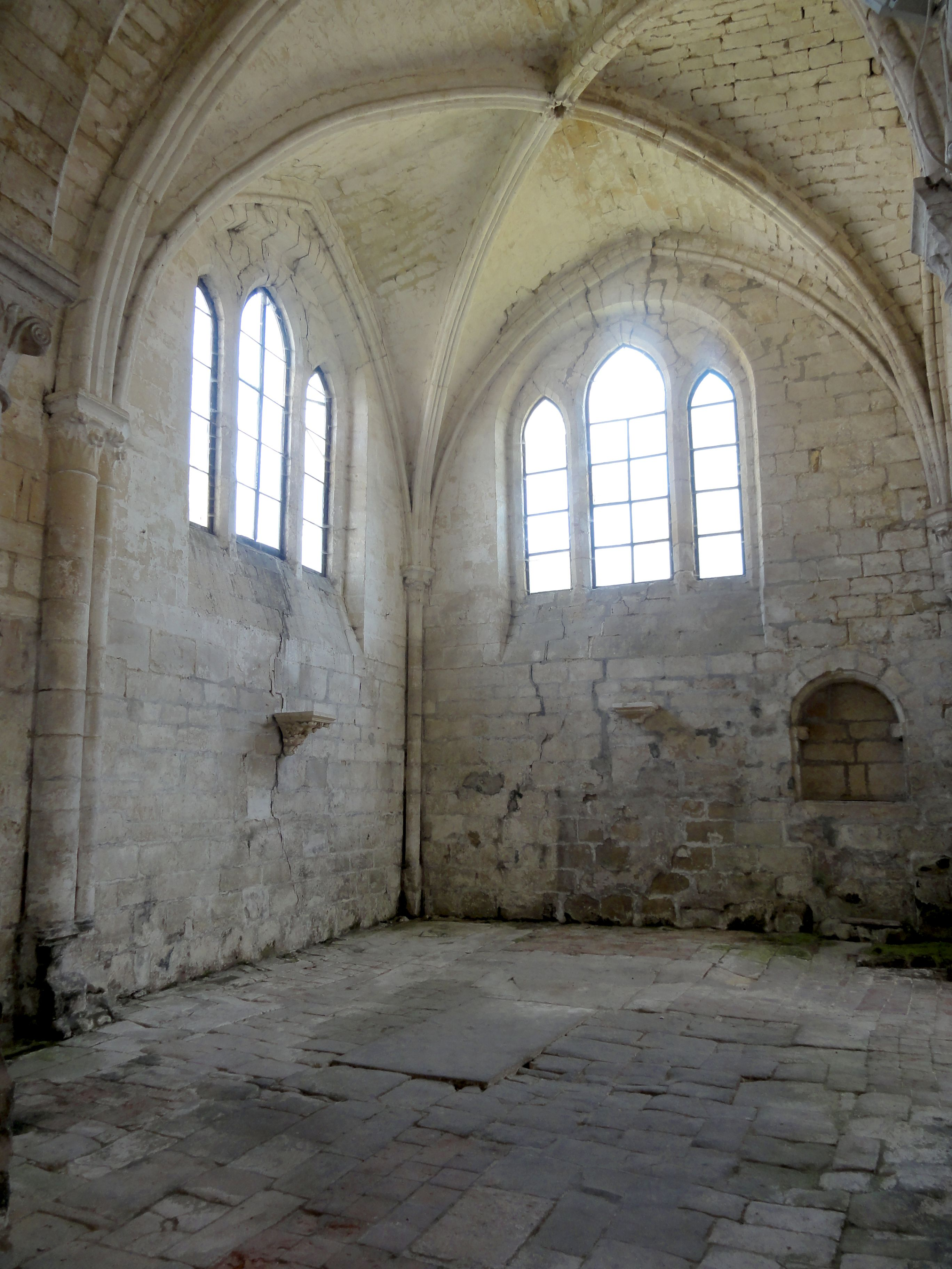 Chapelle nord, vue vers le nord-est.